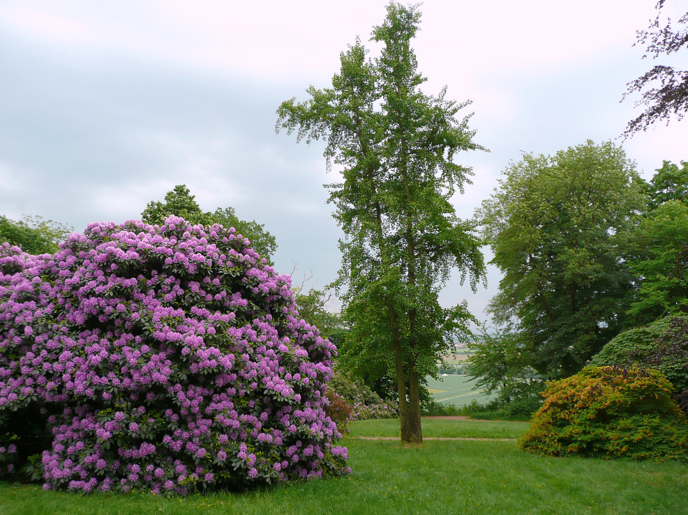 Rhododrenblüte im Ohrbergpark